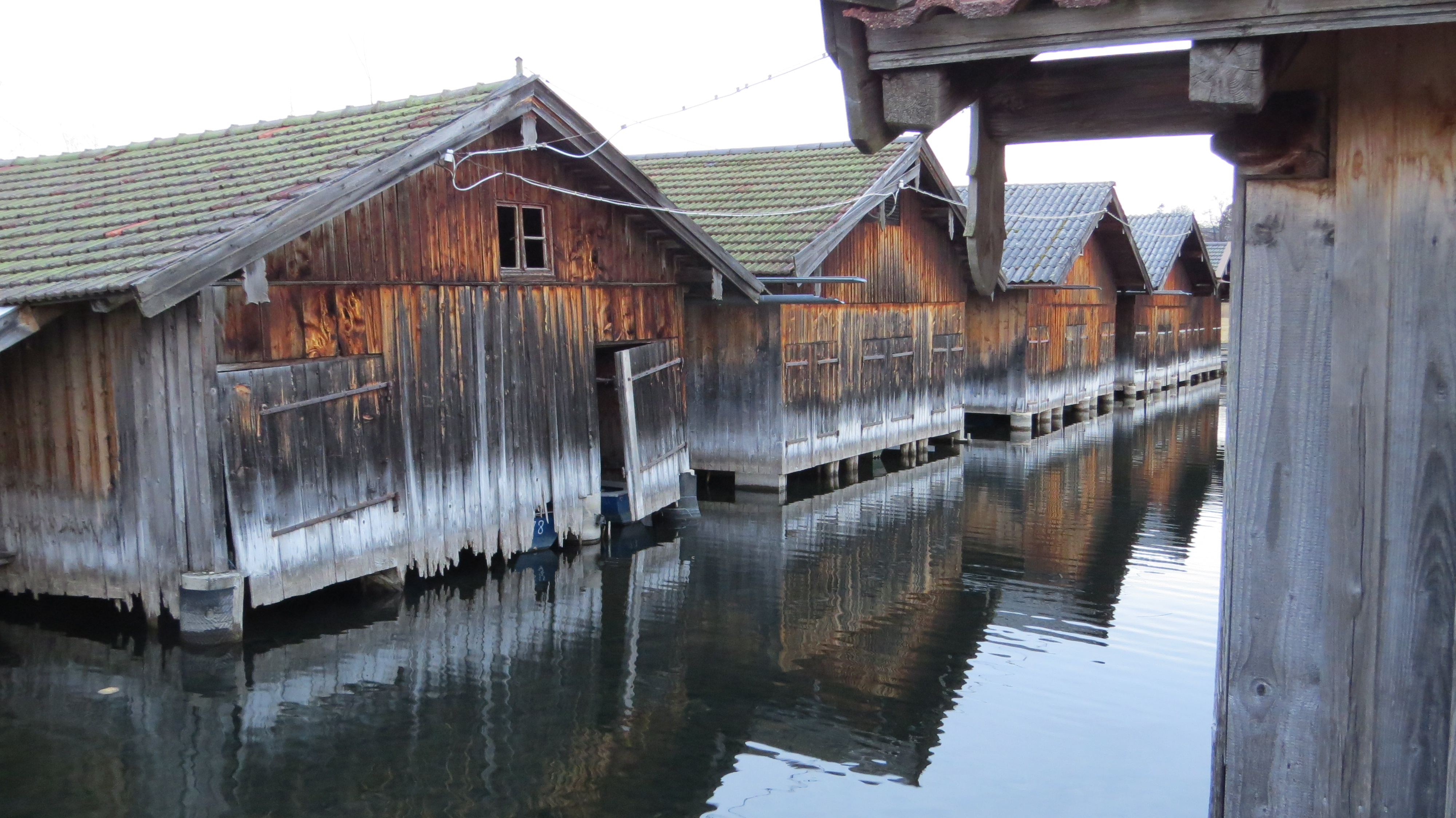 Bootshäuser in Seehausen am Staffelsee